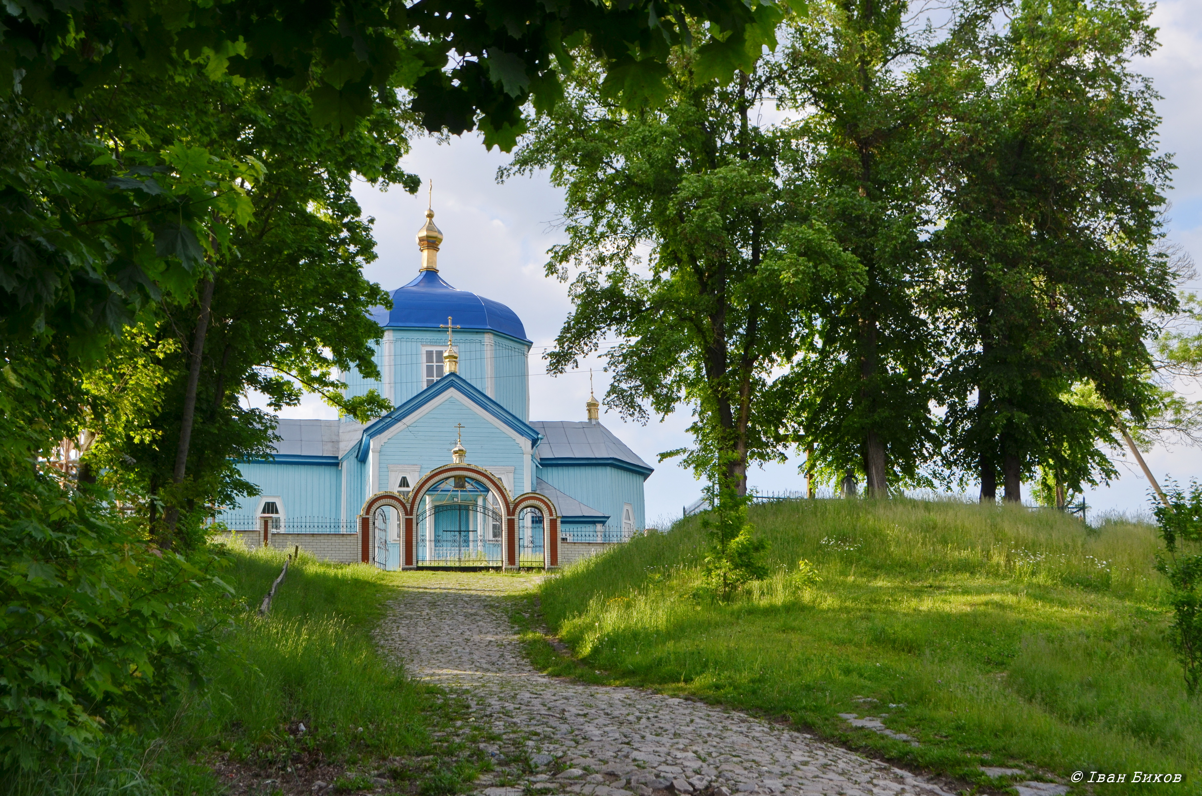 Церква Преображення Господнього, с. Левків, вул. Донецька, 1